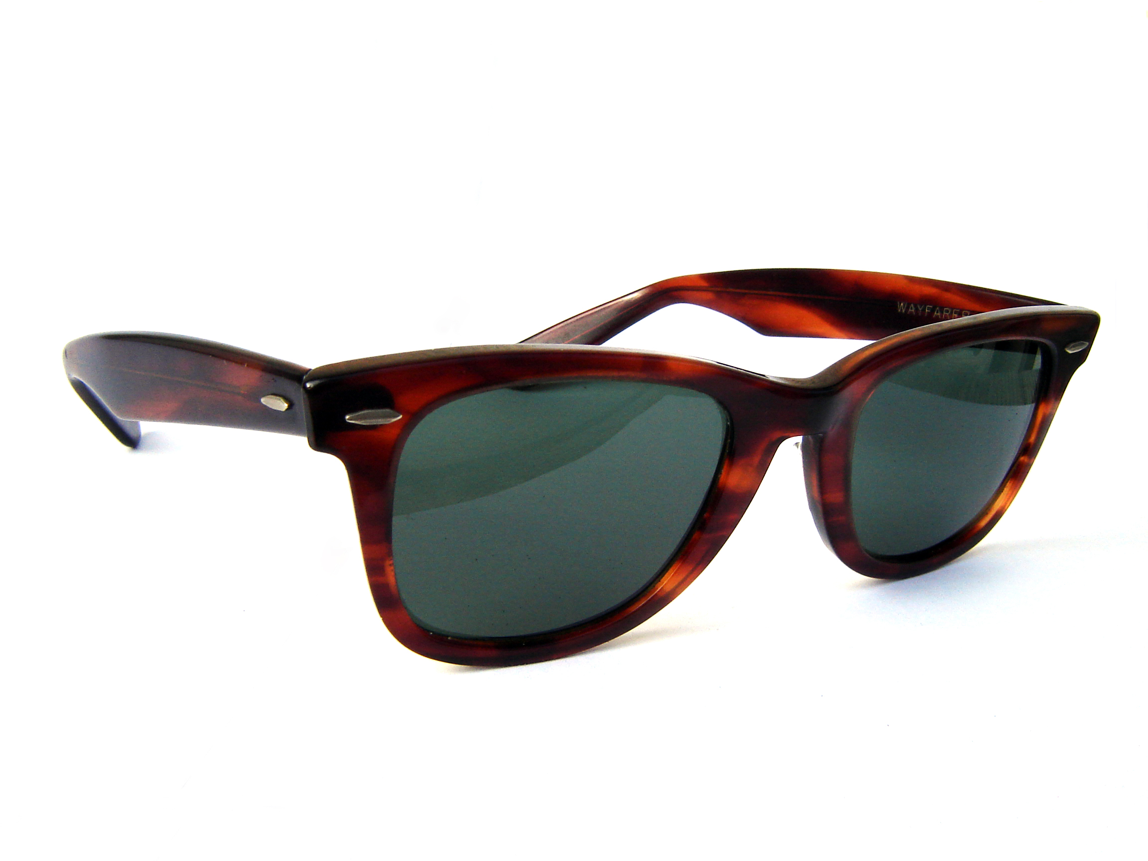 Ray Ban Wayfarer sunglasses; model B&L5022; pre-dates 1980s; US-made